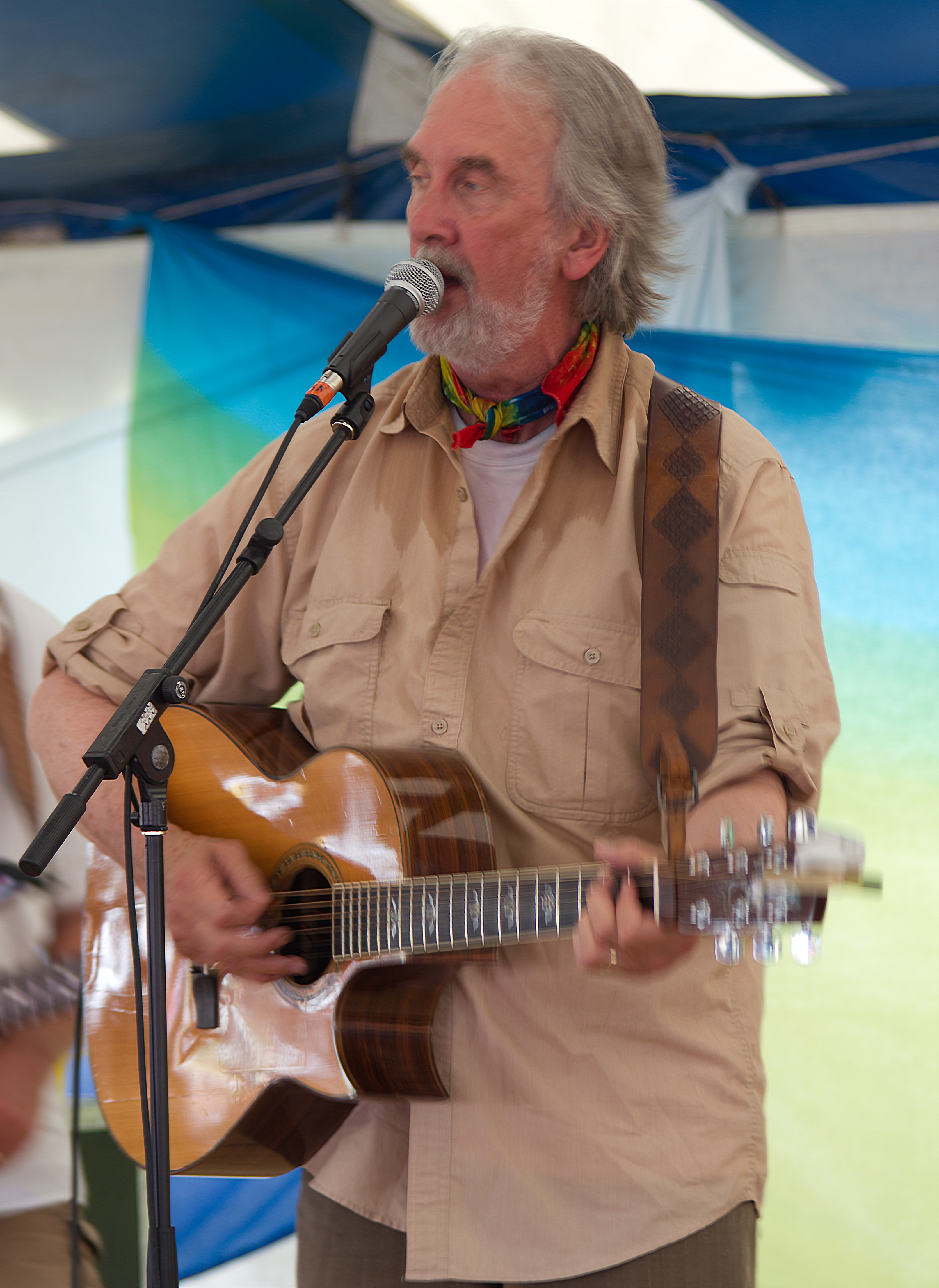 Fred Penner performing in 2011